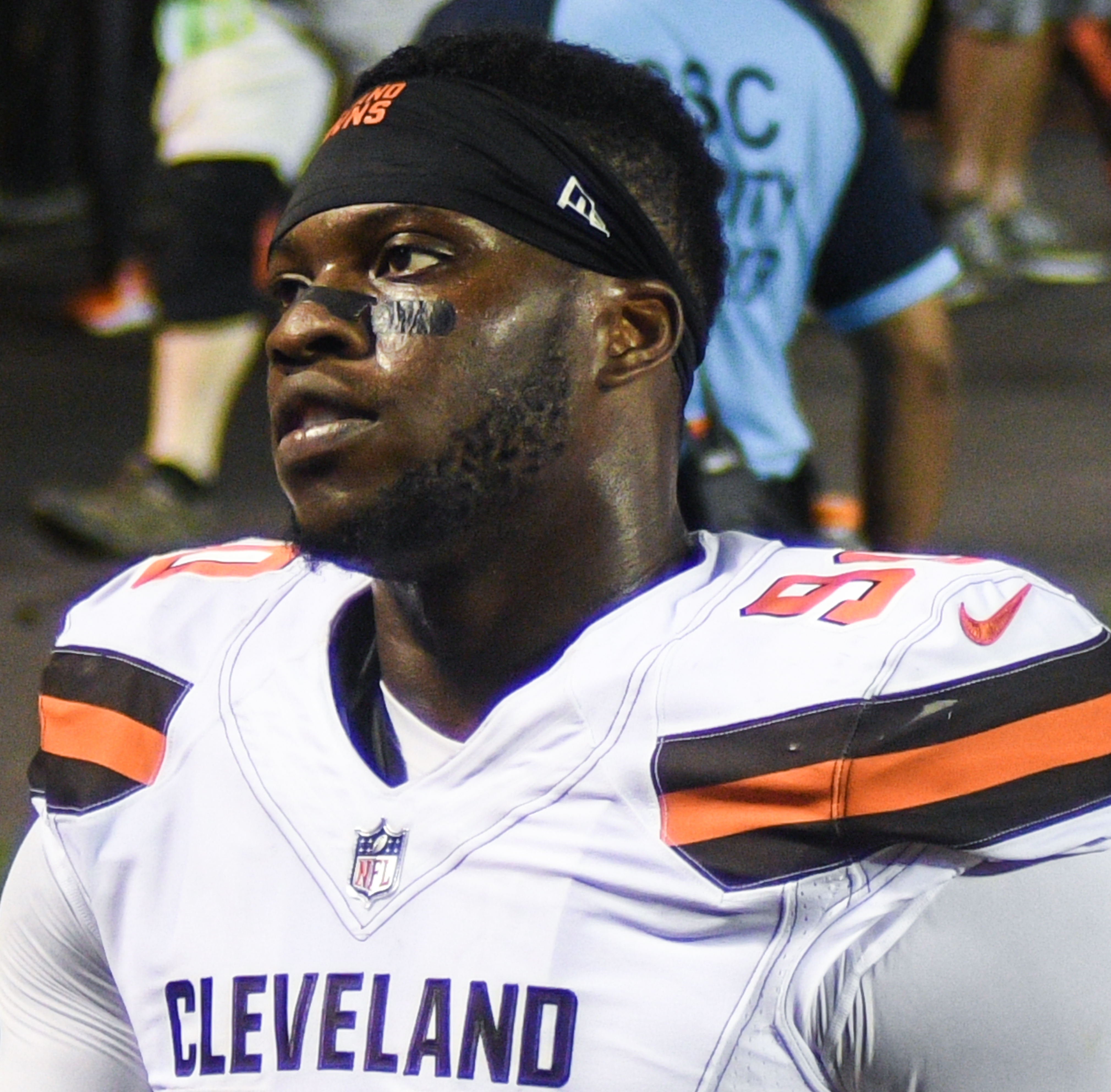 Emmanuel Ogbah